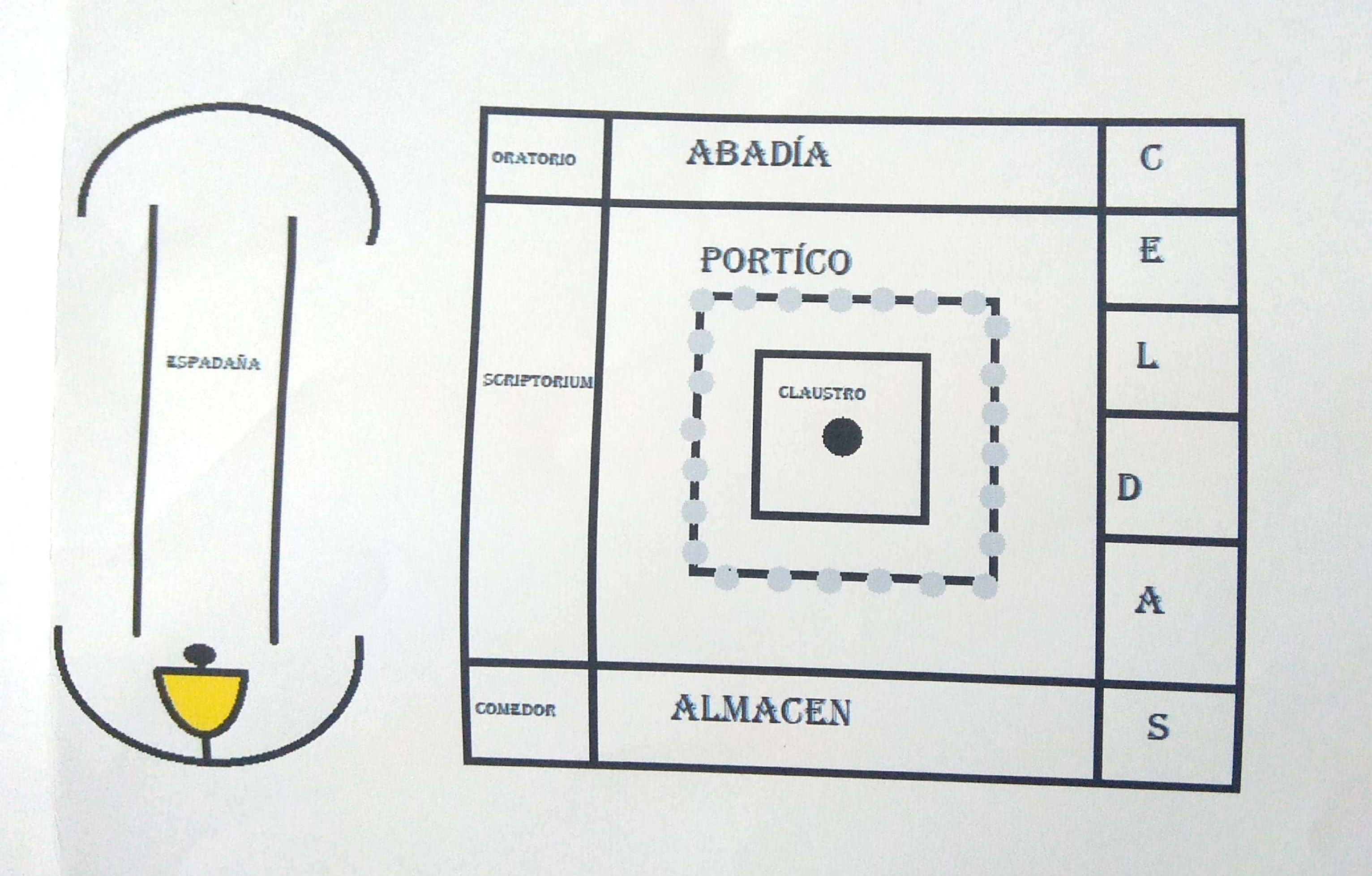 Se describe la organización de la planta que se cree tenía el monasterio